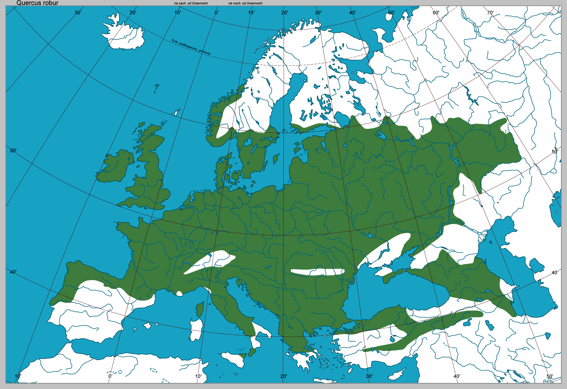 Wykonane w marcu 2005 przez Borcha3kawki na podstawie mapki zamieszczonej w artykule Adama Boratyńskiego 1995r. Poprawiona.